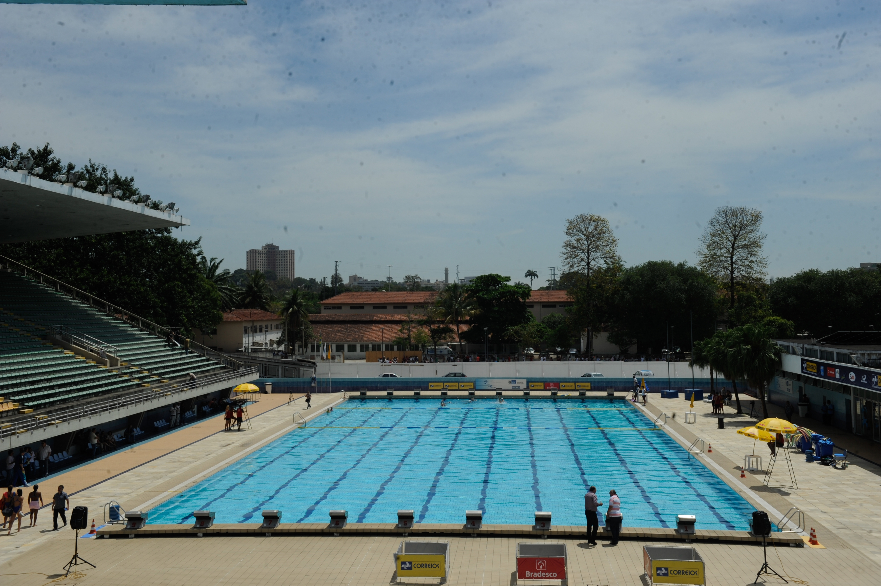 Rio de Janeiro - O Parque Aquático Julio de Lamare, no Complexo do Maracanã, foi reaberto três meses antes do previsto. A reabertura foi marcada por apresentações de atletas do salto ornamental, nado sincronizado e de nadadores da seleção brasileira de juniores. Tânia Rêgo / Agência Brasil